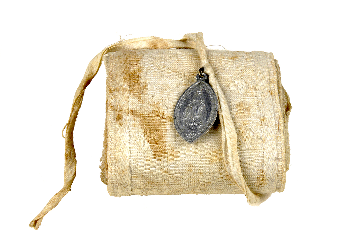 Fotografies dels objectes de l'exposició permanent de la sala "Secà i Muntanya" del Museu Valencià d'Etnologia - Fotografies de Mateo Gamon. Faixa de melic per a infants. Amb medalla. S'utilitzava per a embolicar els melics dels nounats per a evitar que s'isca el melic. Segle XX.